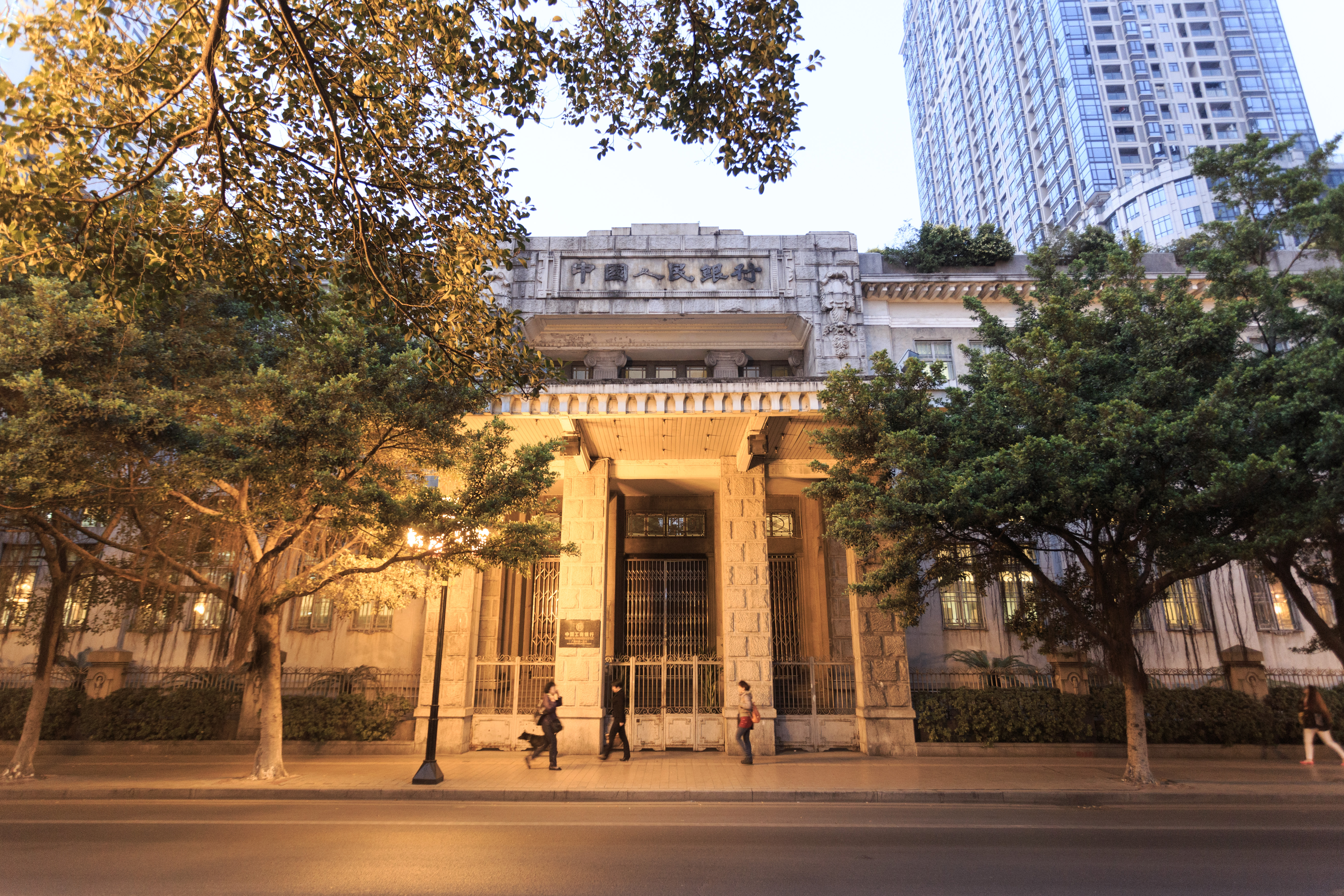 广州中央银行旧址